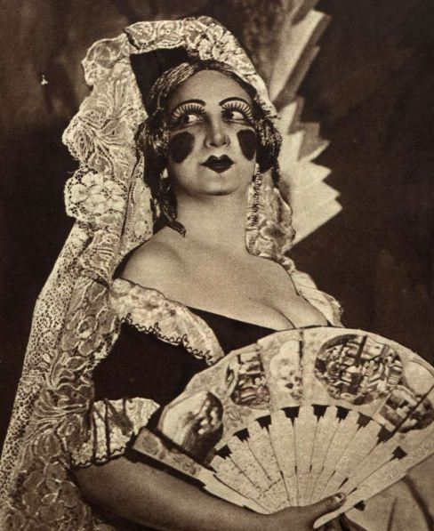 La actriz Irene López Heredia en una escena de la obra de teatro Farsa y licencia de la Reina Castiza, de Ramón María del Valle-Inclán